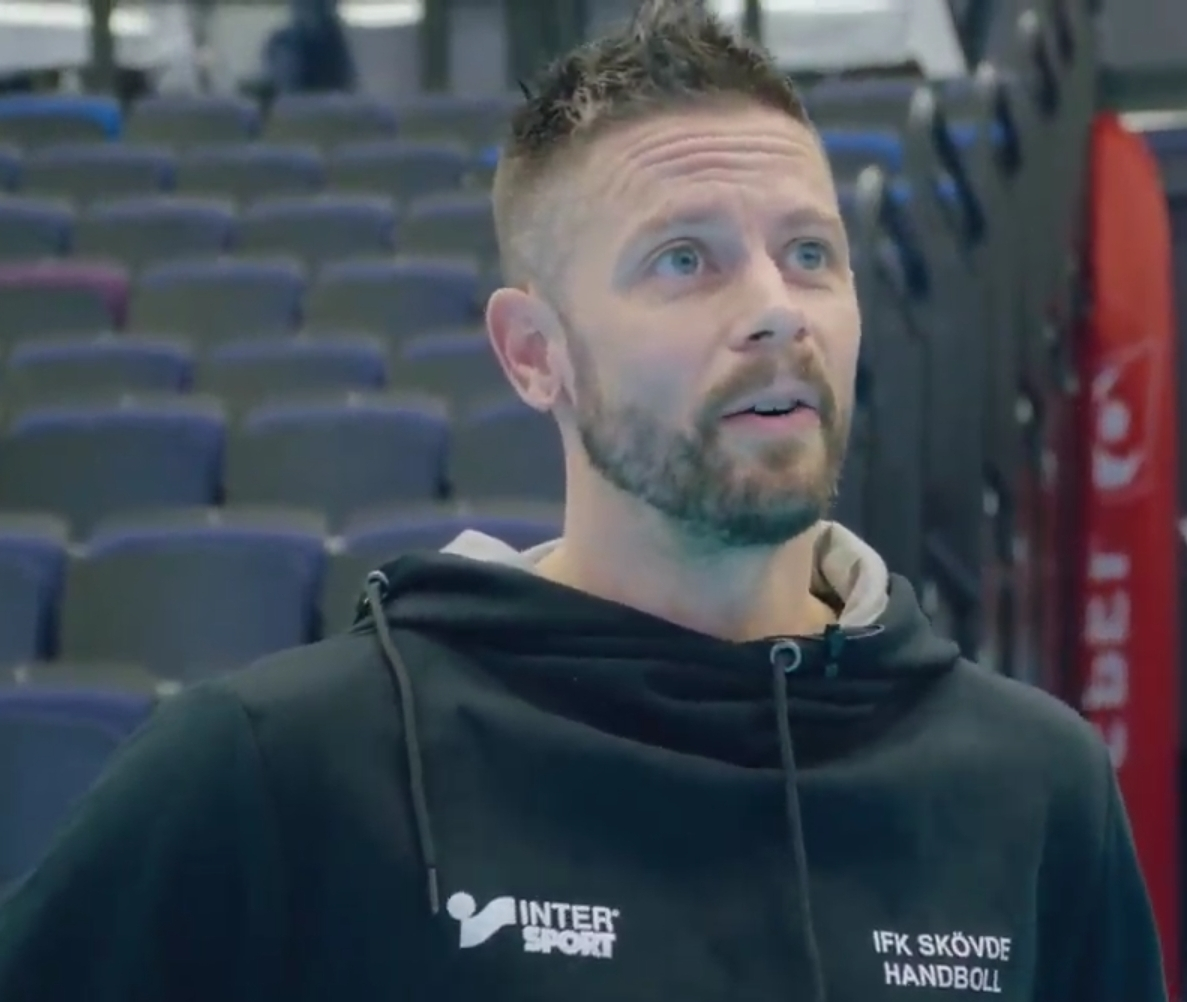 Rasmus Wremer innan match mot Ystad